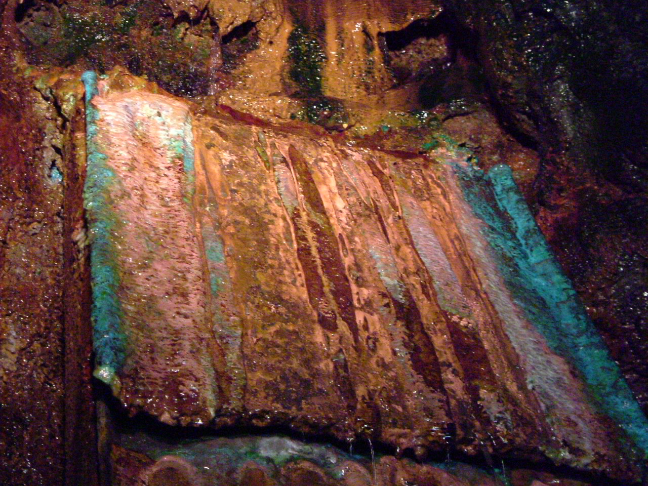 Kilianstollen Marsberg; Entkupferung von Erzlösung über Eisenplatten; Bildung vom "Zementkupfer" (hellrosa)